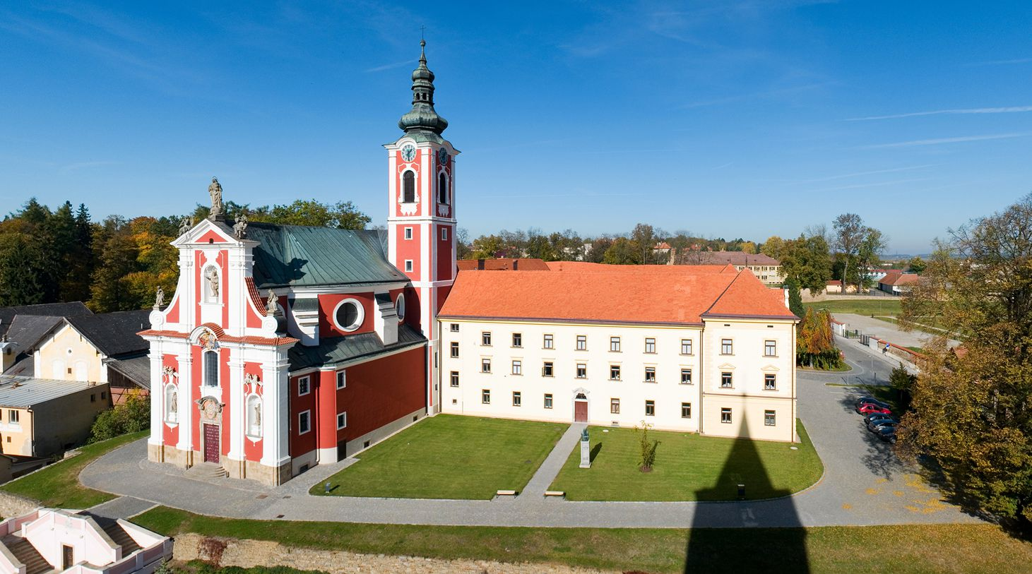 Vystavěn byl v roce 1719 karmelitánským řádovým architektem Martinem Wittwerem.